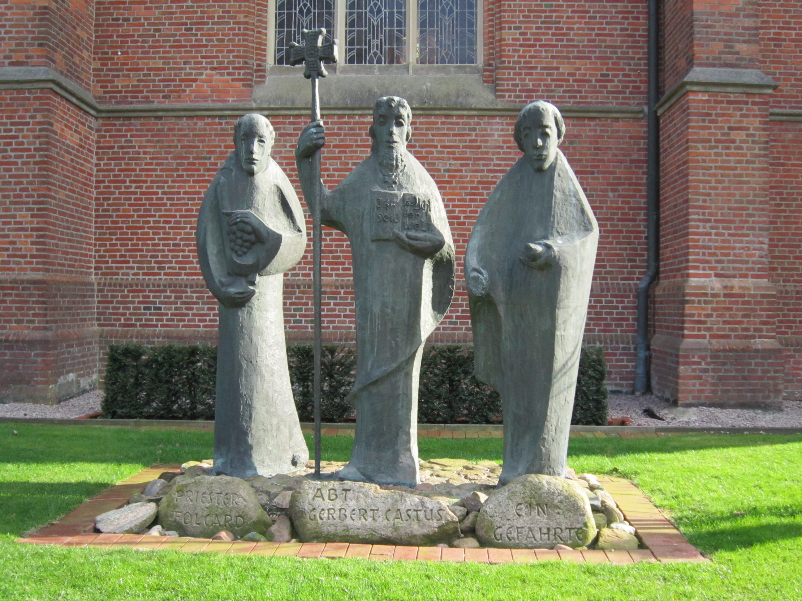 Denkmal des Abtes Gerbert Castus und zweier Begleiter bei der St. Vitus-Kirche in Visbek. (Landkreis Vechta, Niedersachsen) Es stellt den Abt Gerbert Castus, den Priester Folcard [1] (einen Mitarbeiter des Willehad) und einen Gefährten der beiden dar, den Grafen Emmig. [2] .